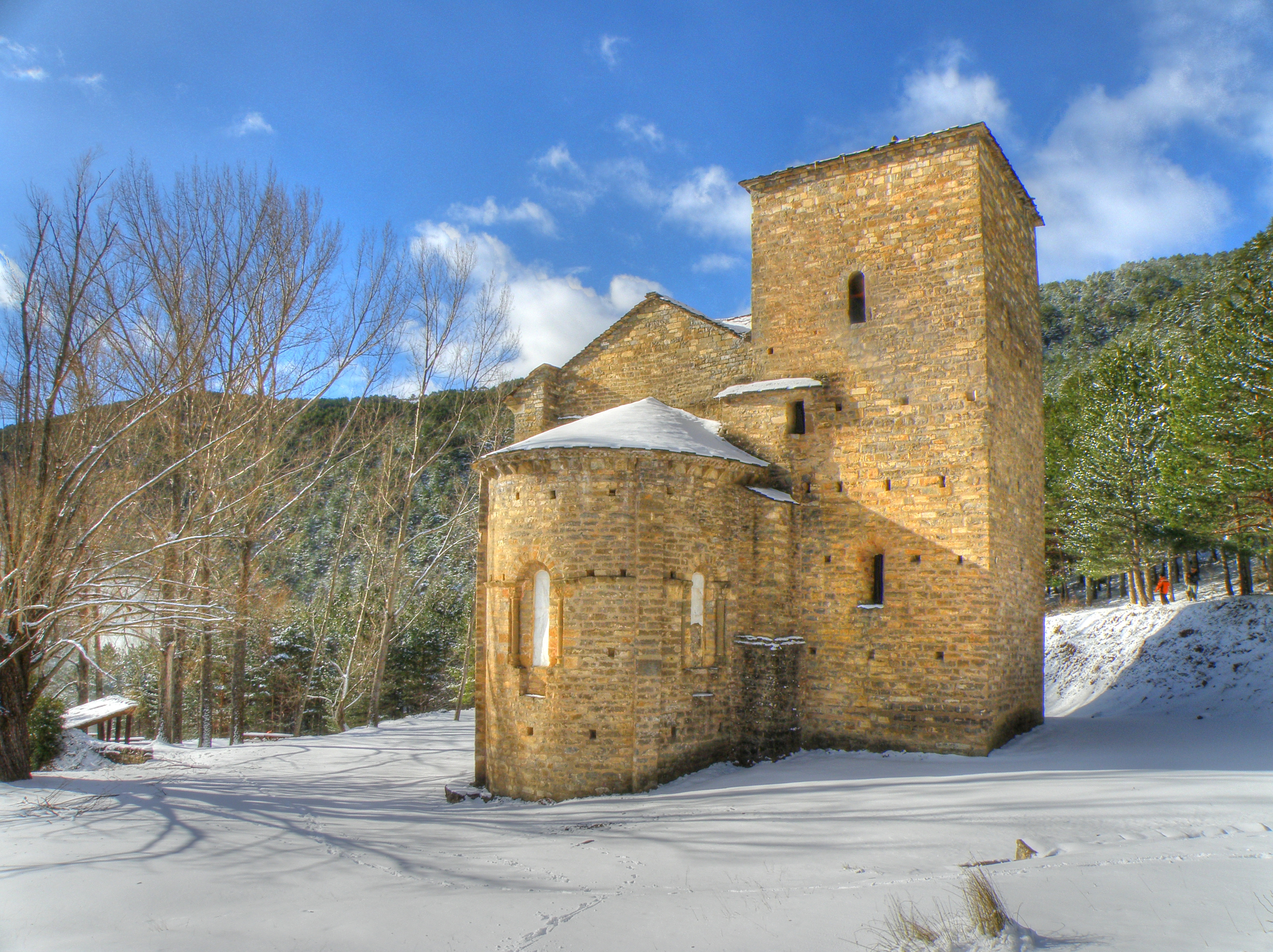 Monasterio de Santa María de Iguacel